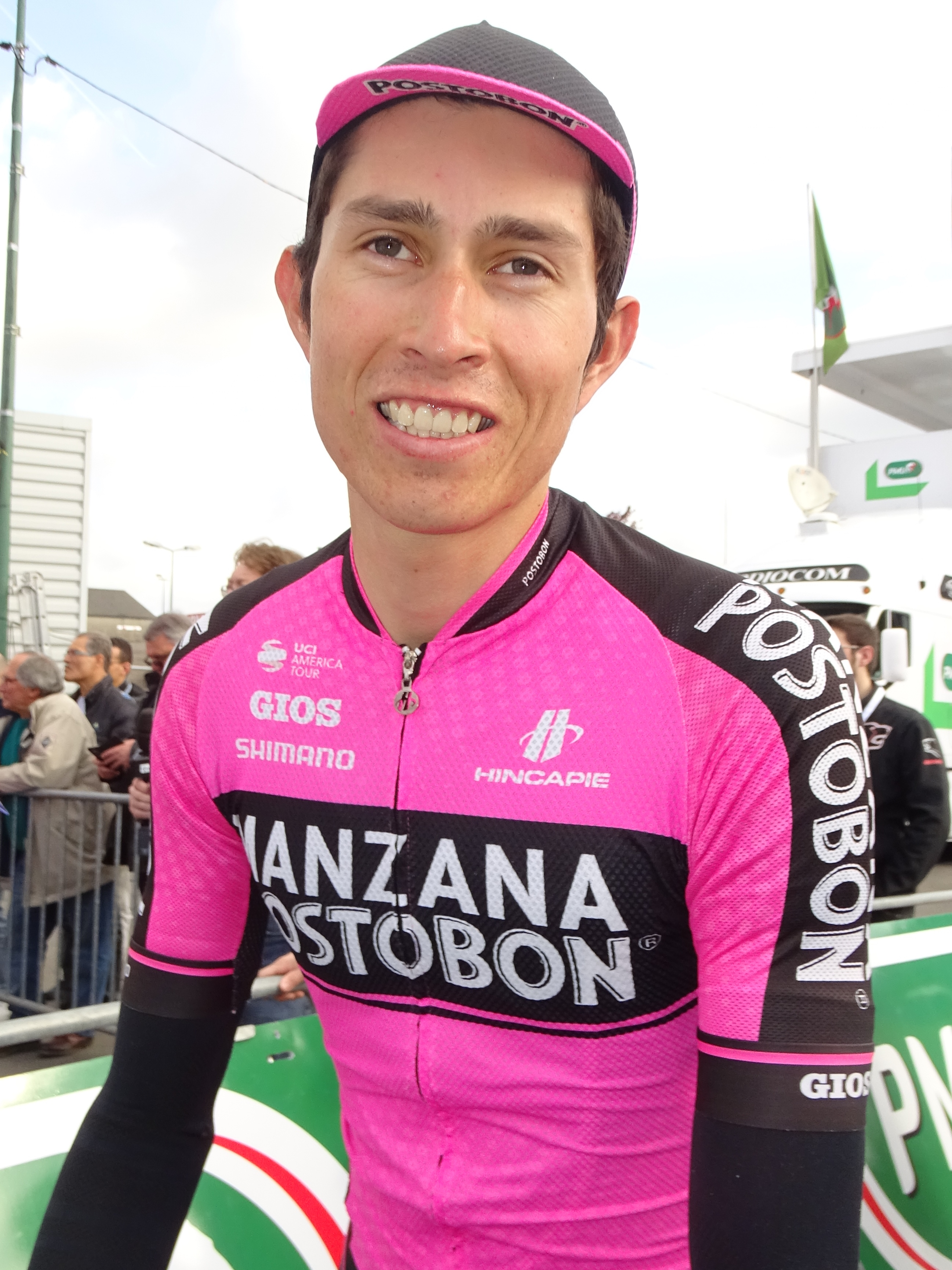 Reportage réalisé le jeudi 13 avril à l'occasion du départ et de l'arrivée du Grand Prix de Denain 2017 à Denain, Nord, Nord-Pas-de-Calais-Picardie, France.